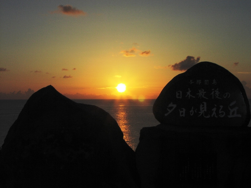 Sunset at Kubura-bari, Yonaguni, Ryukyu Islands. The last sunset in Japan.